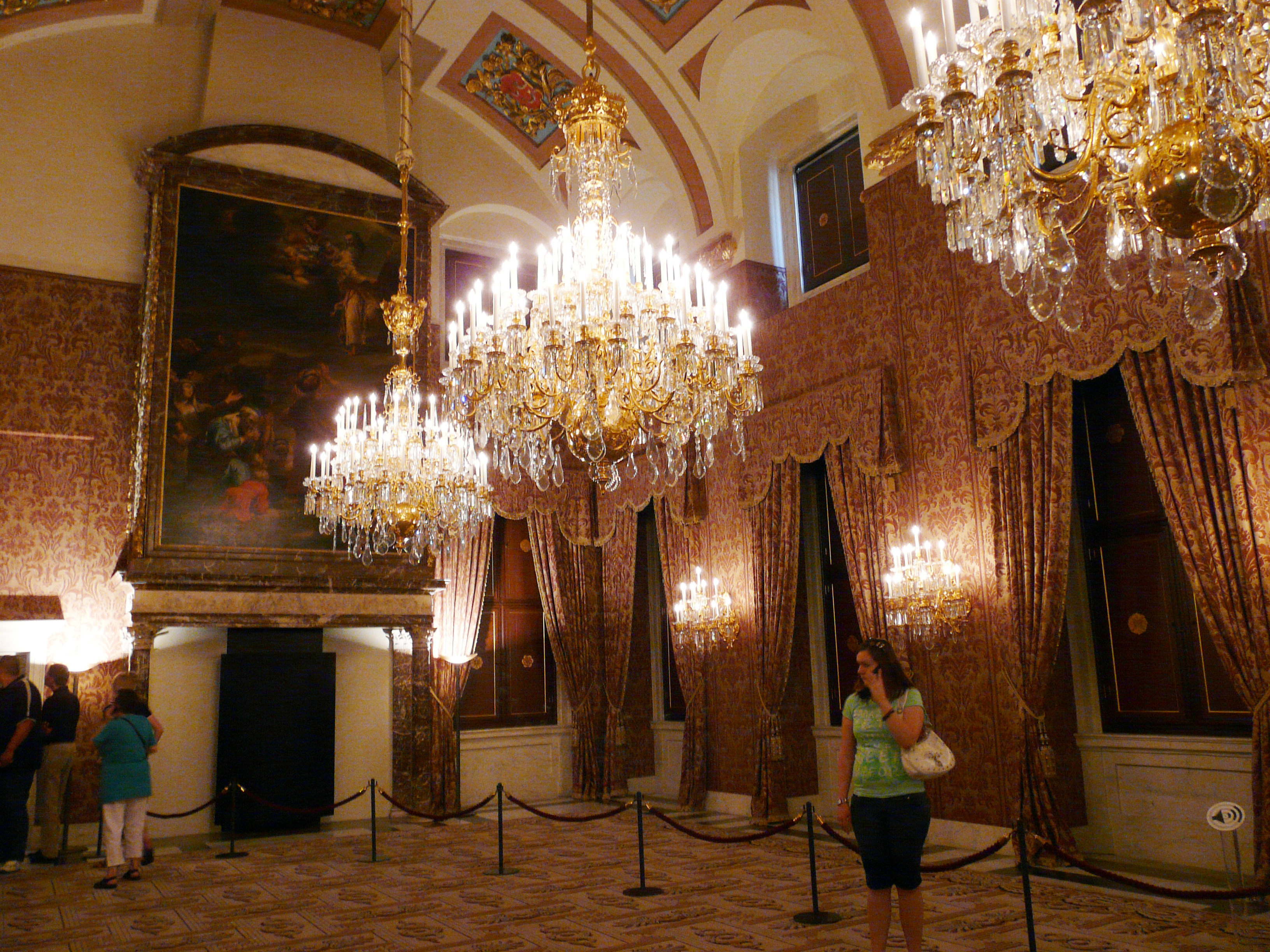 Schepenzaal in het Paleis op de Dam in Amsterdam